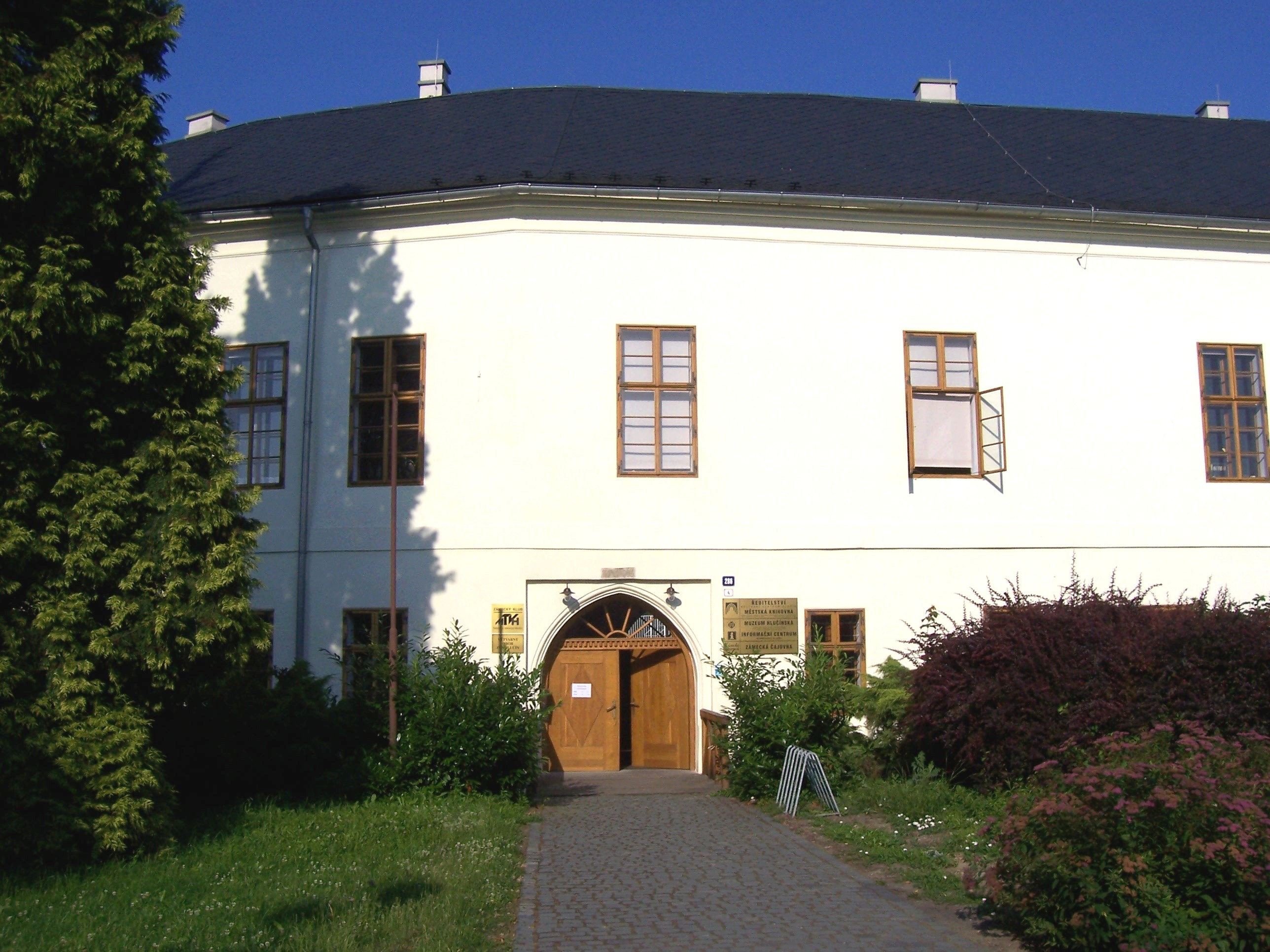 Zámek Hlučín a sídlo Muzea Hlučínska